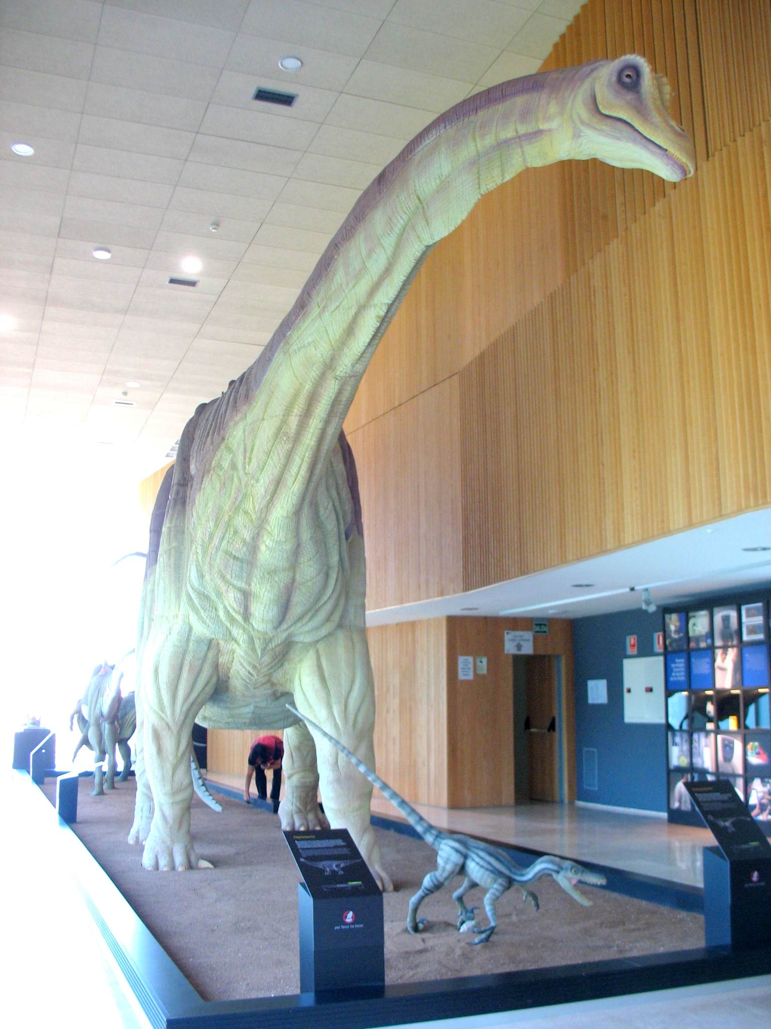 Figura de Lohuecotitan pandafilandi de Lo Hueco. Museo Paleontológico de Castilla-La Mancha (Cuenca, España)